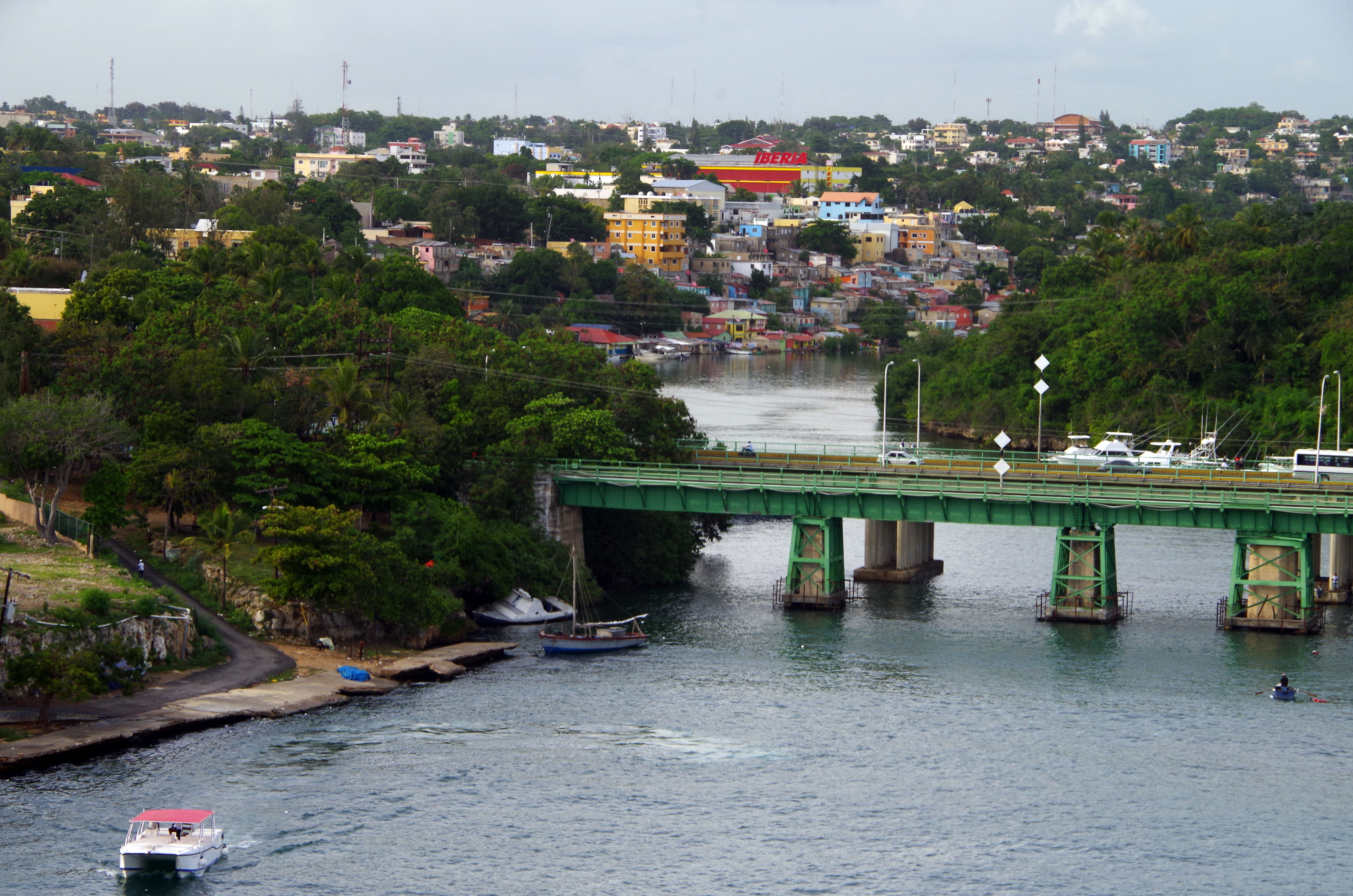 La Romana vom Kreuzfahrtterminal gesehen